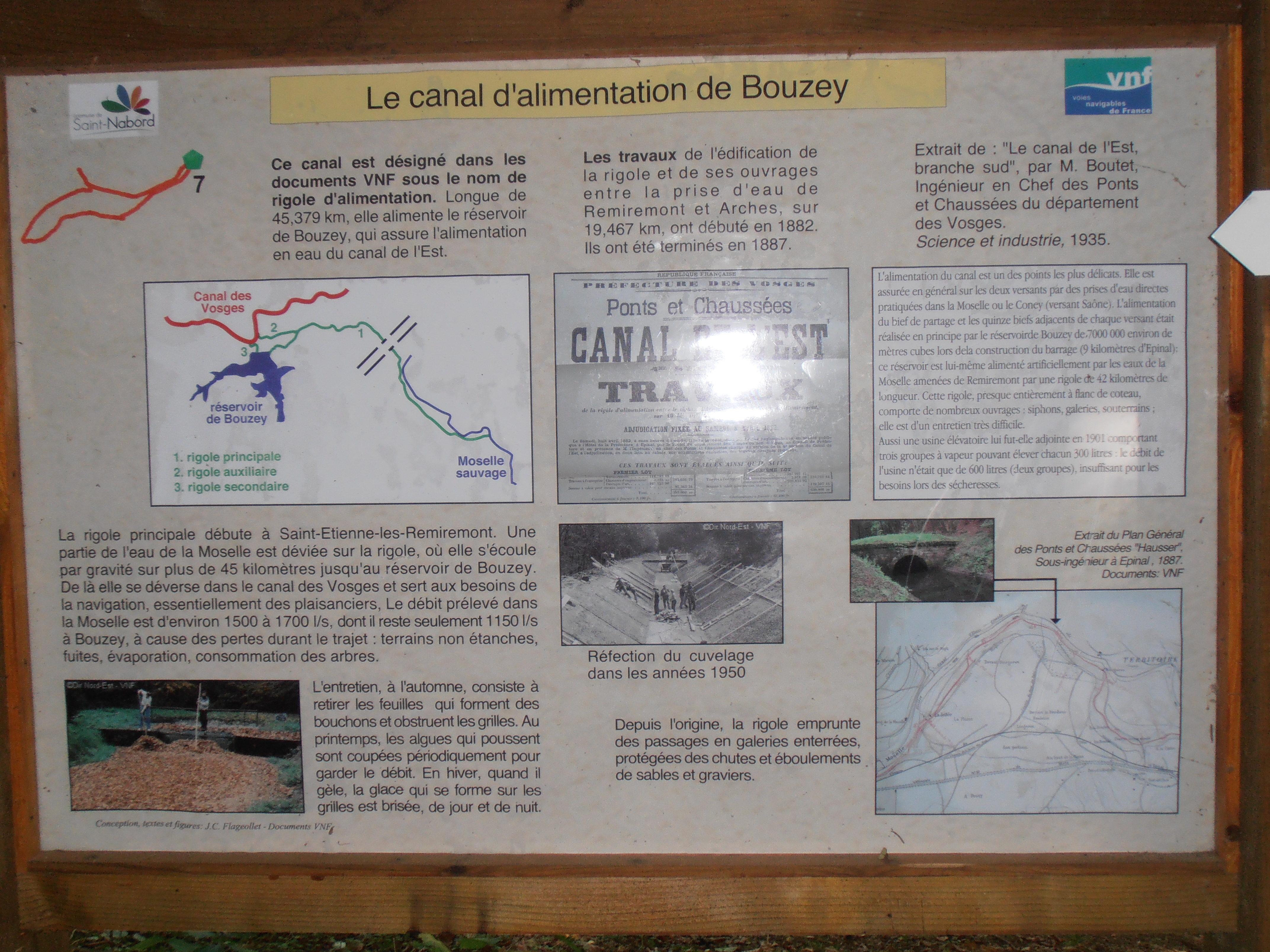 Vosges, Moraine de Noirgueux sur les communes de Saint-Nabord, Saint-Étienne-lès-Remiremont, Éloyes, Remiremont